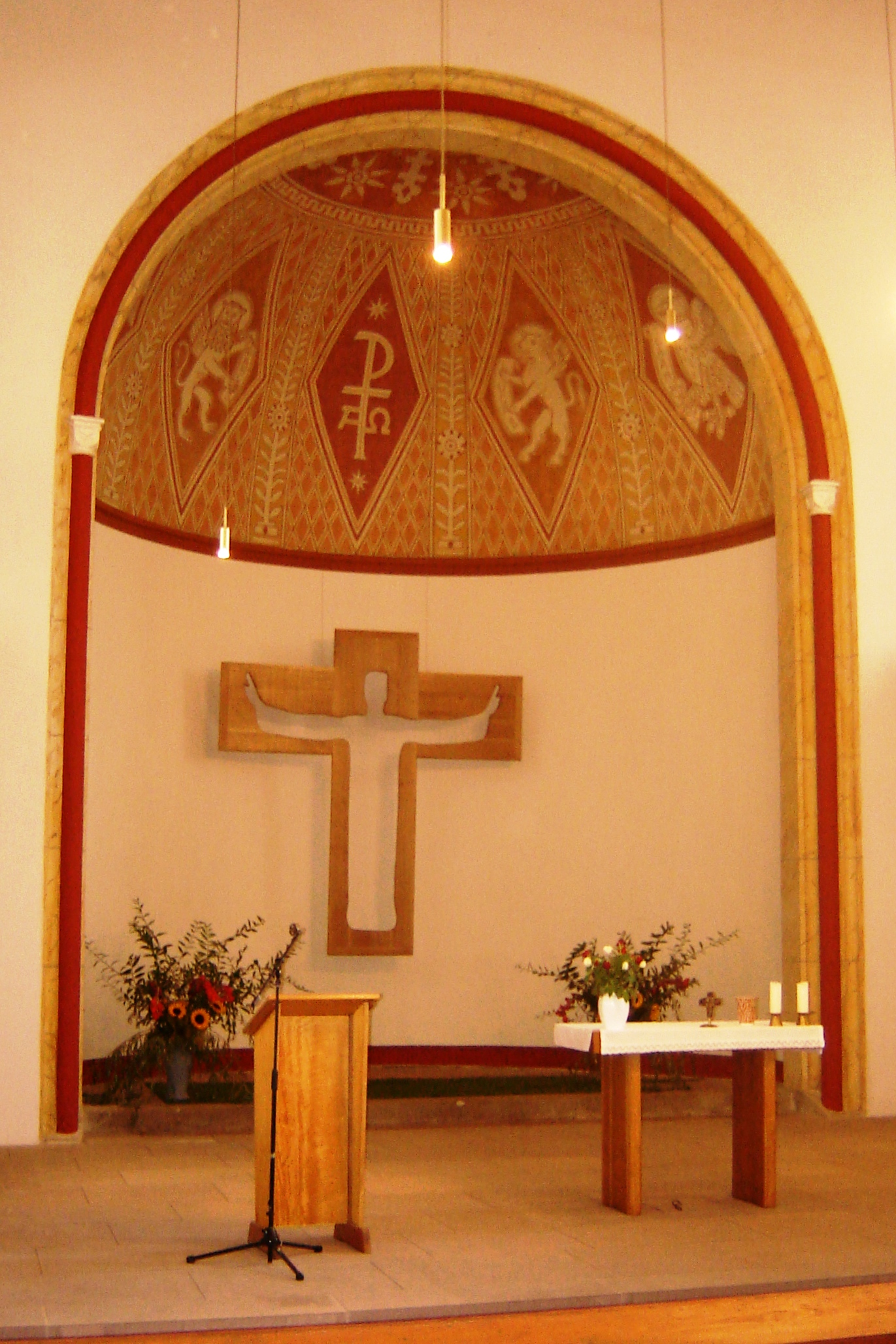 St.-Andreas-Kirche in Biere, Sachsen-Anhalt, Deutschland (Altarraum)